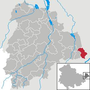 Jückelberg in Thuringia - District Altenburger Land